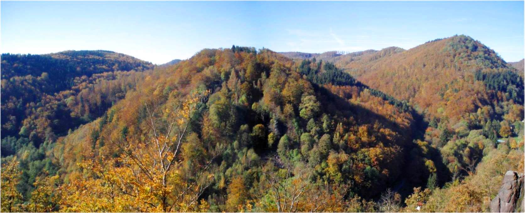 Blick vom Gänseschnabel ins Behretal